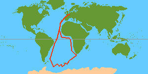 Journey of Charles Bouvet de Lozier 1738 - 1739